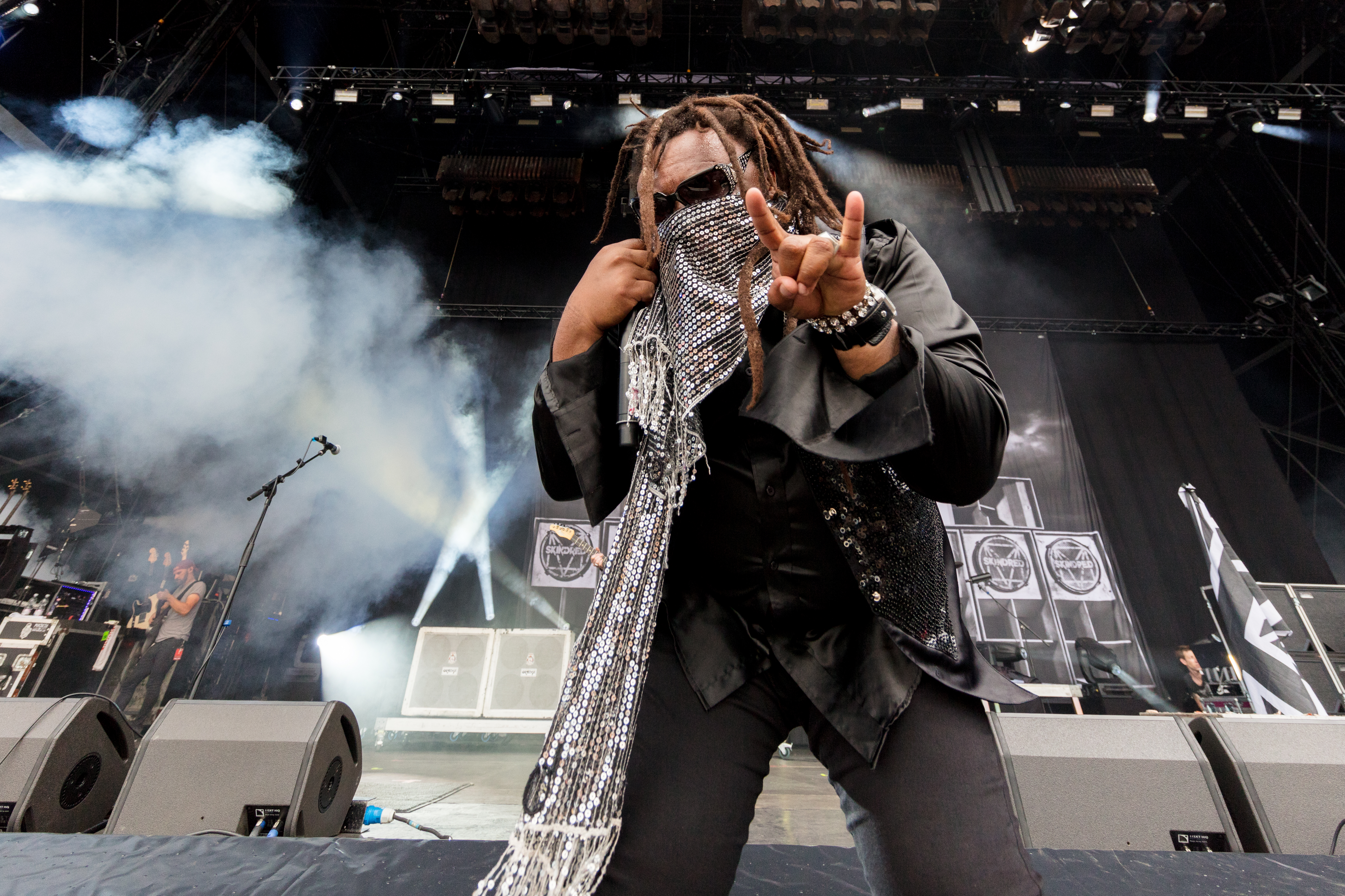 Skindred during Rock am Ring at Nürburgring, Nürnburg, Rheinland Pfalz, Germany on 2017-06-02, Photo: Sven Mandel